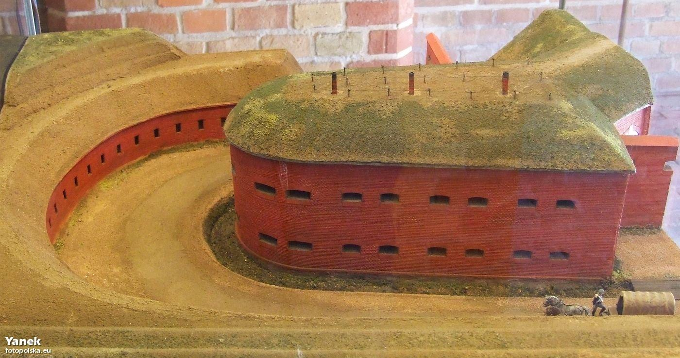 Model Kaponiery Południowej.